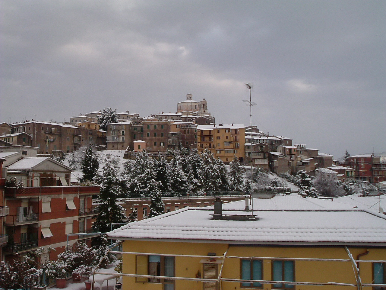 nevicata a castel madama